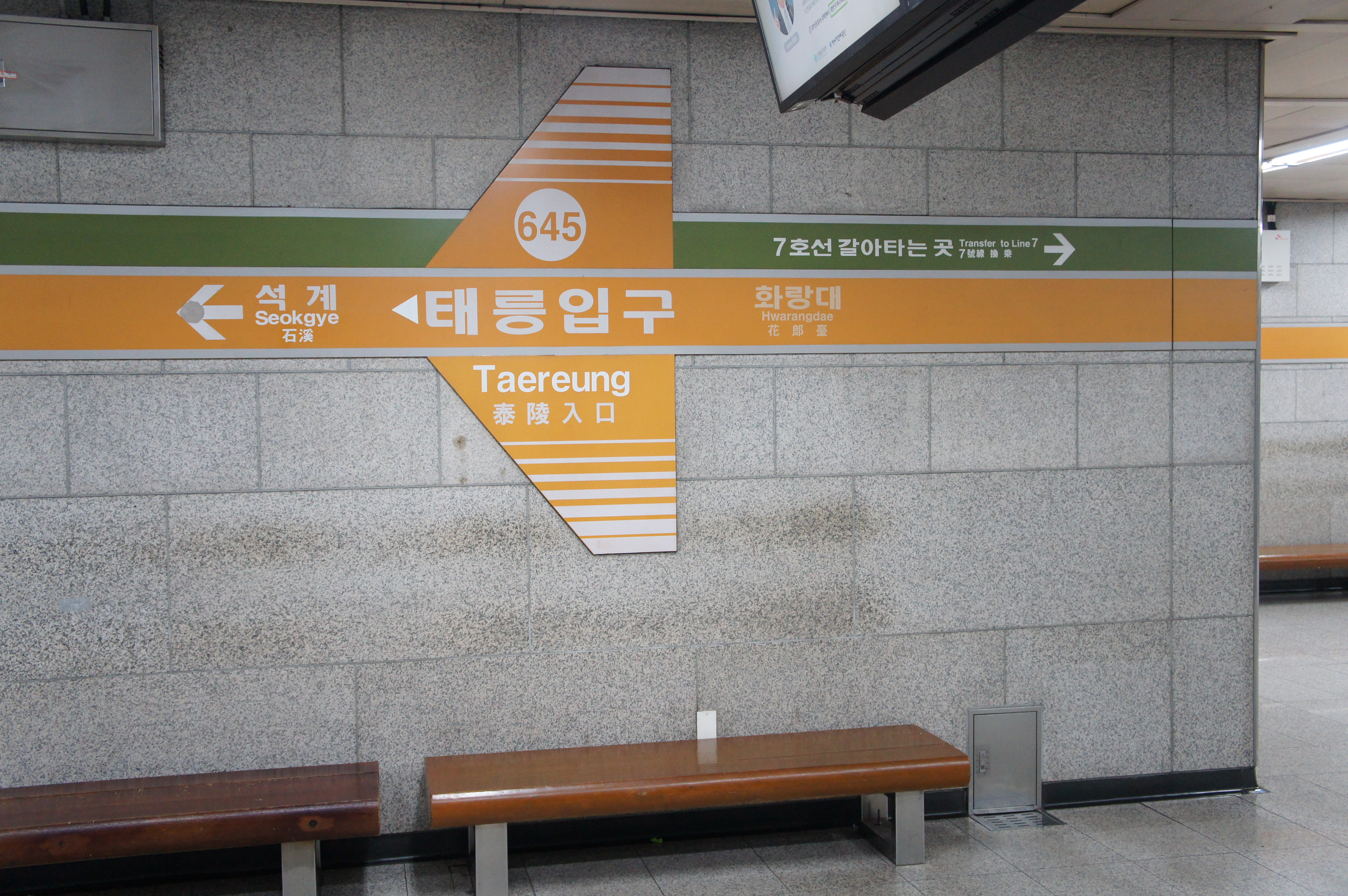 태릉입구역 역명판